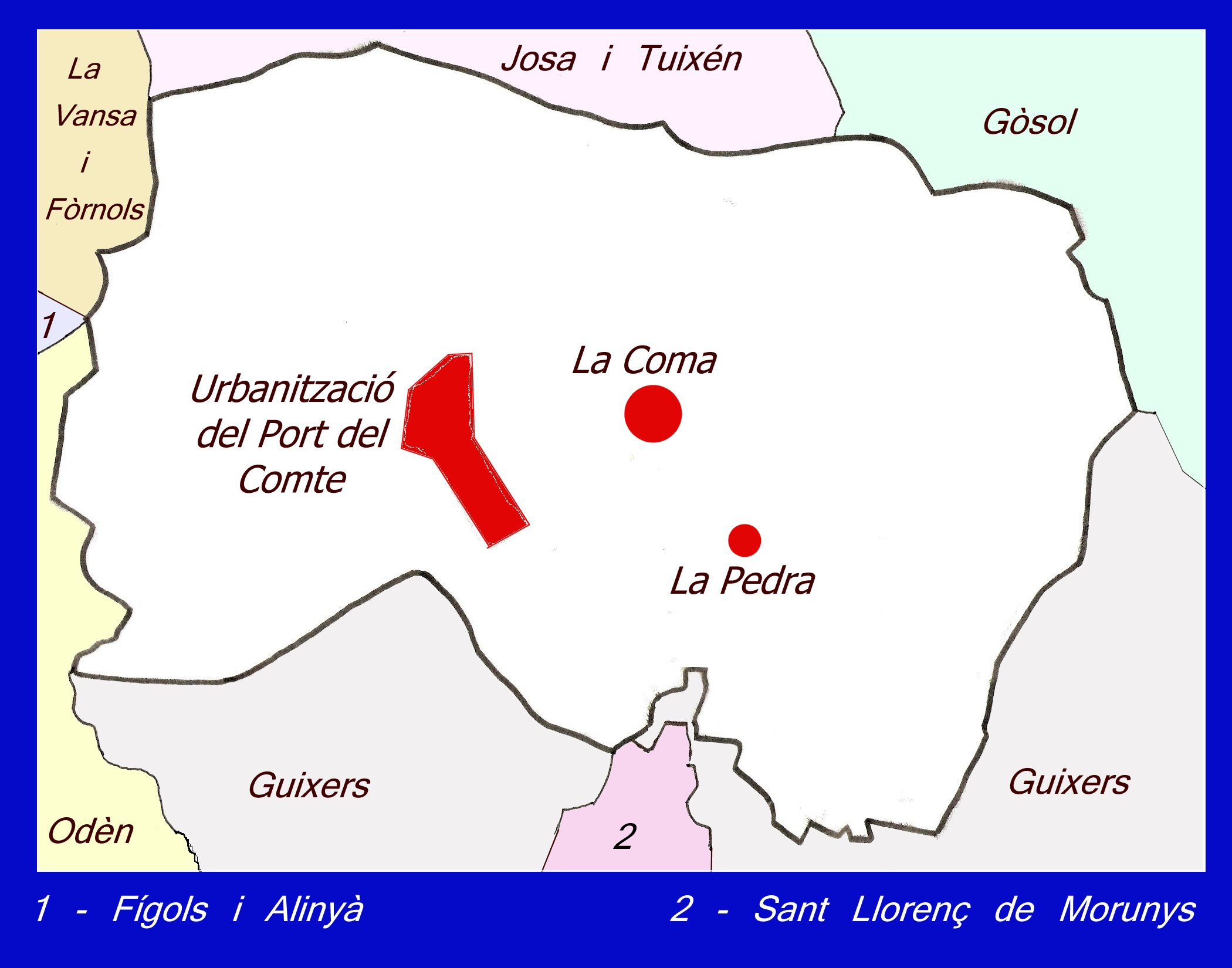 Mapa del municipi de la Coma i la Pedra (Solsonès) amb els municipis limítrofes i les entitats de població